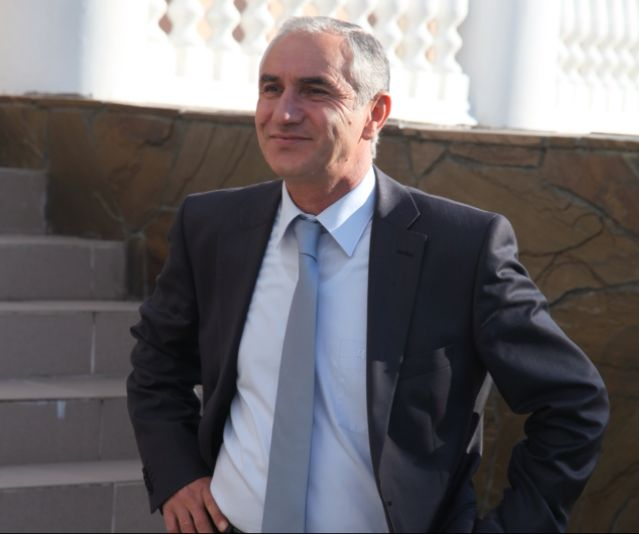 Спикер Парламента РА